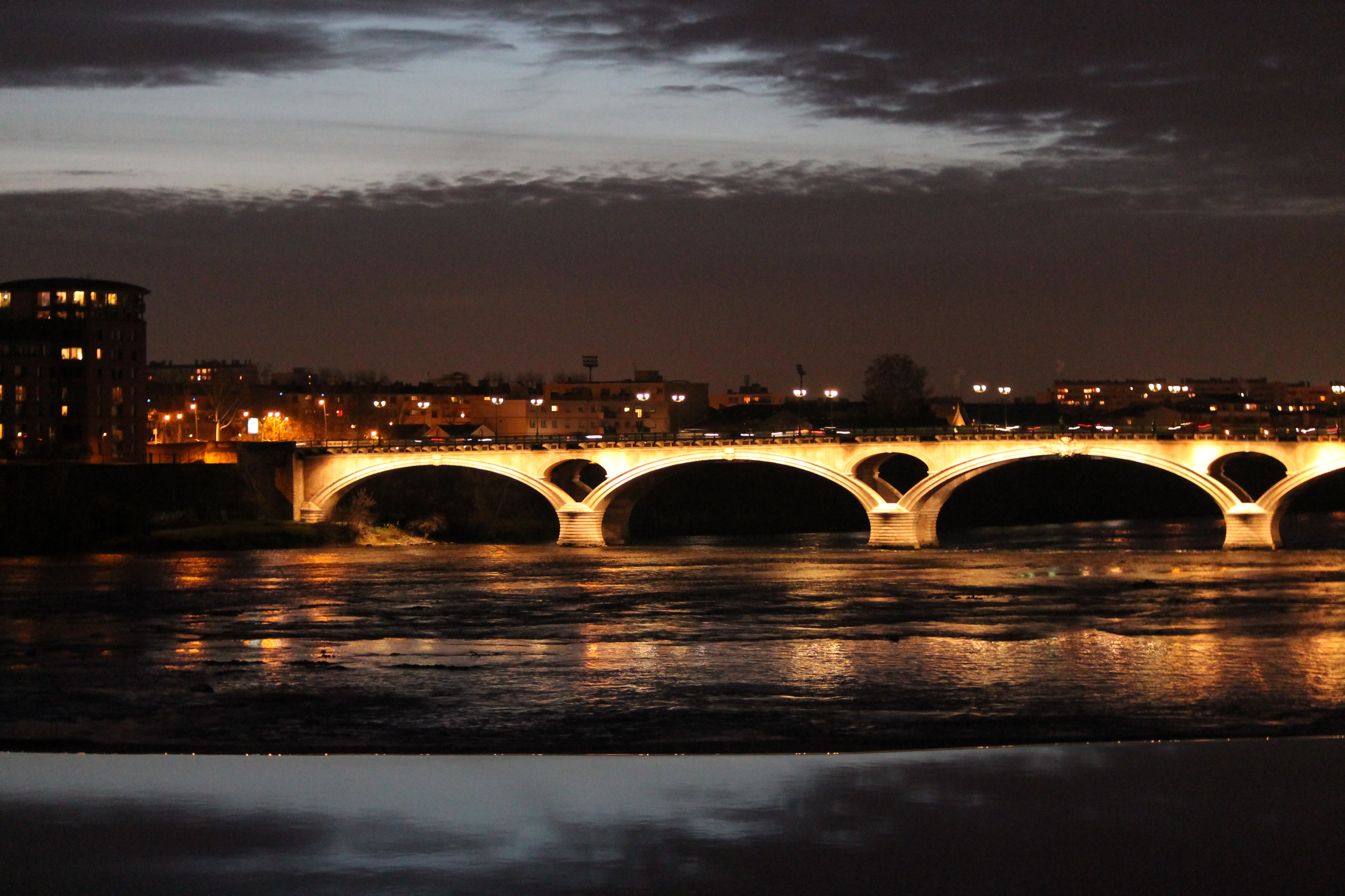 Le Pont des Catalans de Toulouse sous la nuit.